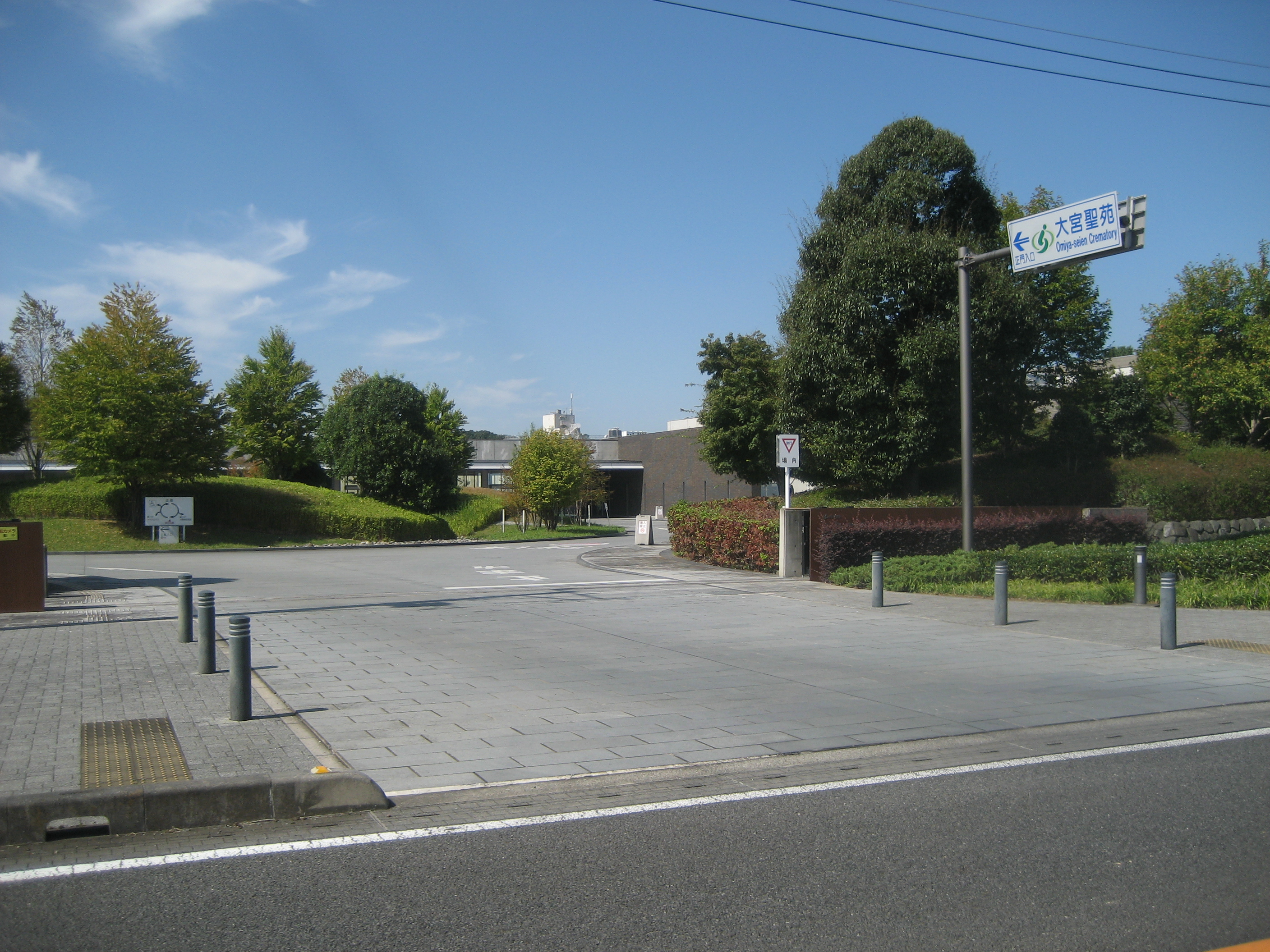 さいたま市見沼区にある大宮聖苑